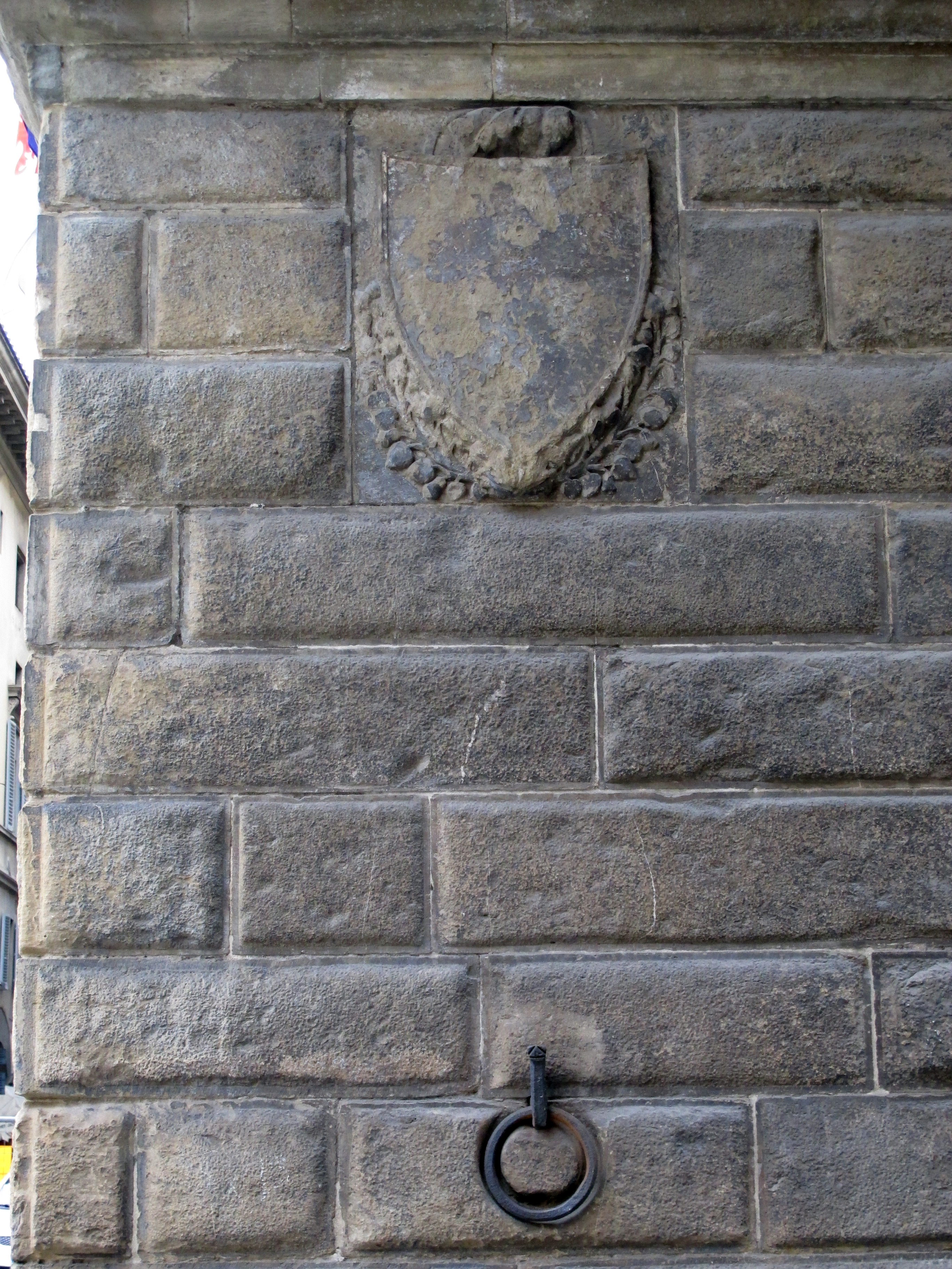 Palazzo cocchi, s. croce, stemma